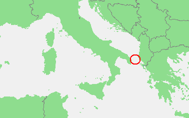 In dutch: Locatie Straat van Otranto.PNG